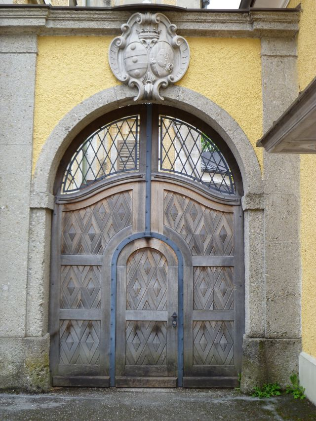 Schloß Aigen, Eingangstor